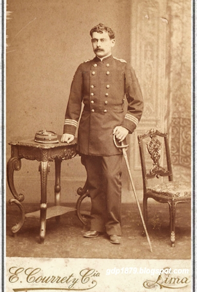 Capitán del Batallón Cívico Movilizado Valdivia Carlos Lalanne, se aprecian dos cintas Chorrillos y Miraflores (enero de 1881), posteriormente sería cambiado al Batallón Cívico Movilizado Lontué, donde participó en un combate en la localidad de Ica (octubre 1882). En la Memoria de la Jefatura Politica y militar del Departamento de Ica, escrita por Leoncio Tagle el 20 de enero de 1883 se lee: "La Secretaría de esta Jefatura ha sido desempeñada por el capitán del Batallón Lontué, don José Antonio Castellon, auxiliado en sus labores por los oficiales del mismo cuerpo, capitán don Carlos Lalanne, teniente don Luis Billet y subtenientes Molinas y Stephens, a quienes me hago un deber en recomendar, especialmente al primero, por su asidua contracción a la oficina"